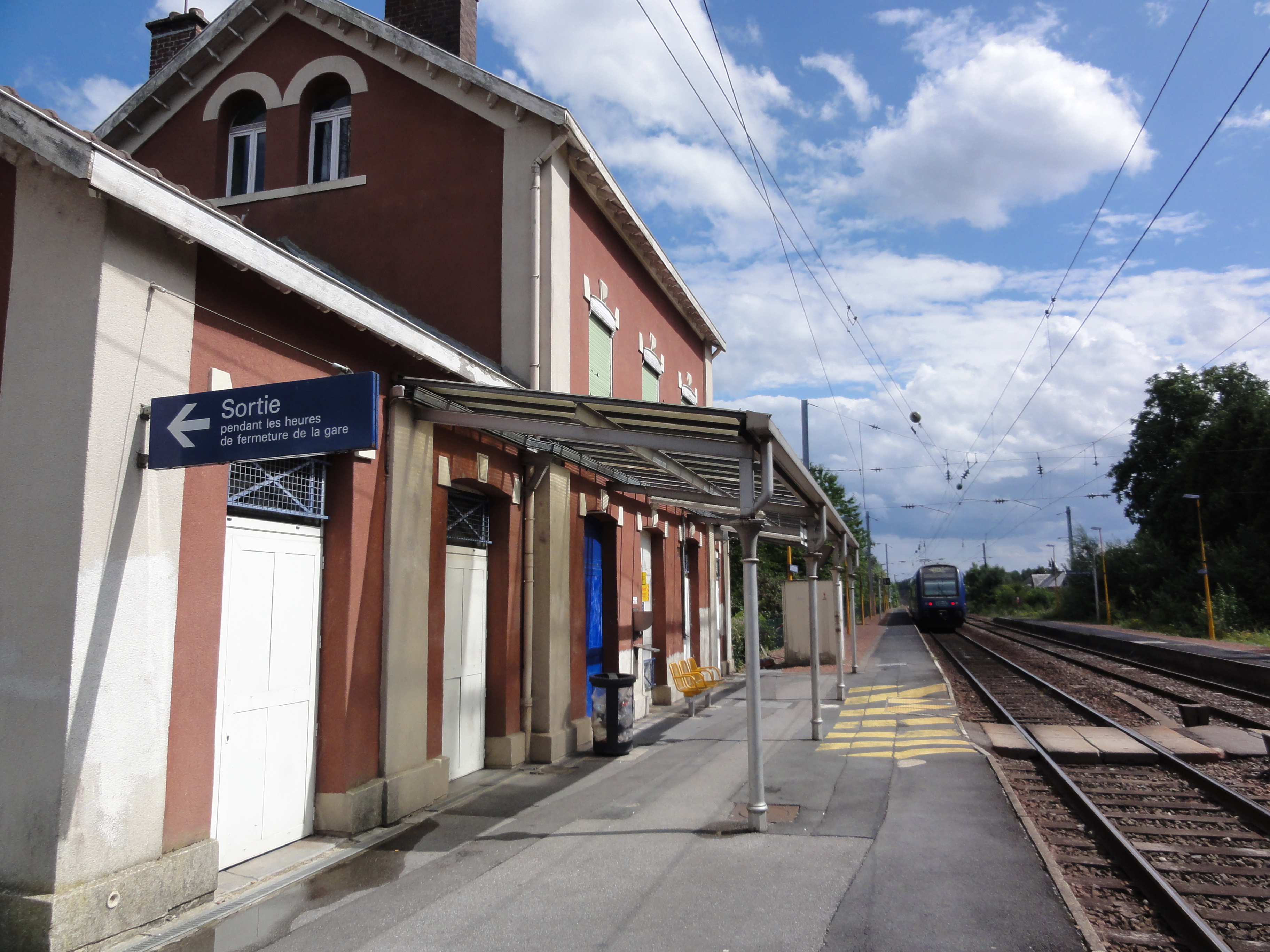 Sains-du-Nord (Nord, Fr) la gare (quai)